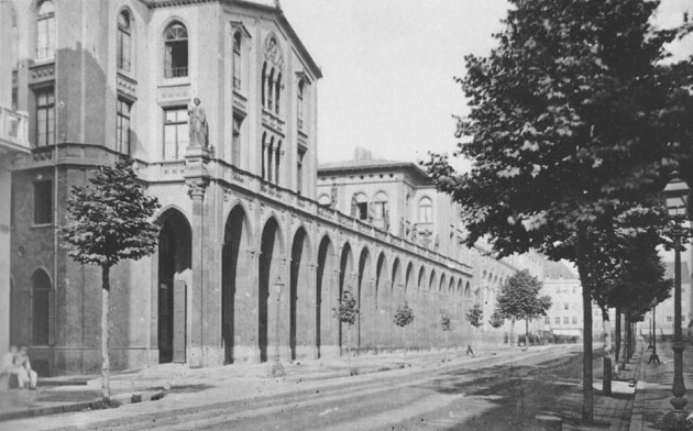 München, Maximilianstraße 6-8 mit den Münzarkaden